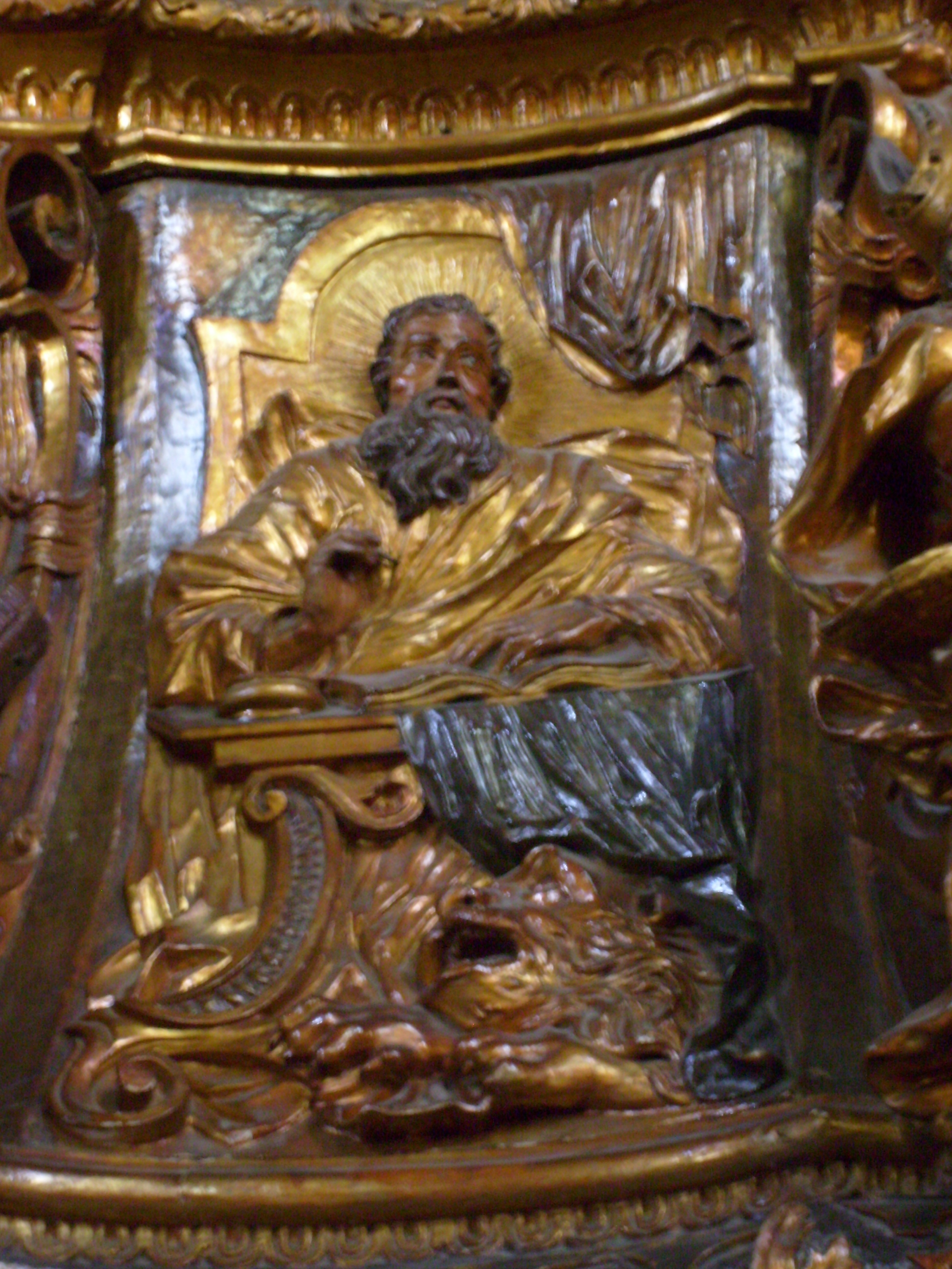 Johannes Nachtigall (1717-1761), Kanzel der Klausenburger Michaelskirche. Der Evangelist Markus.